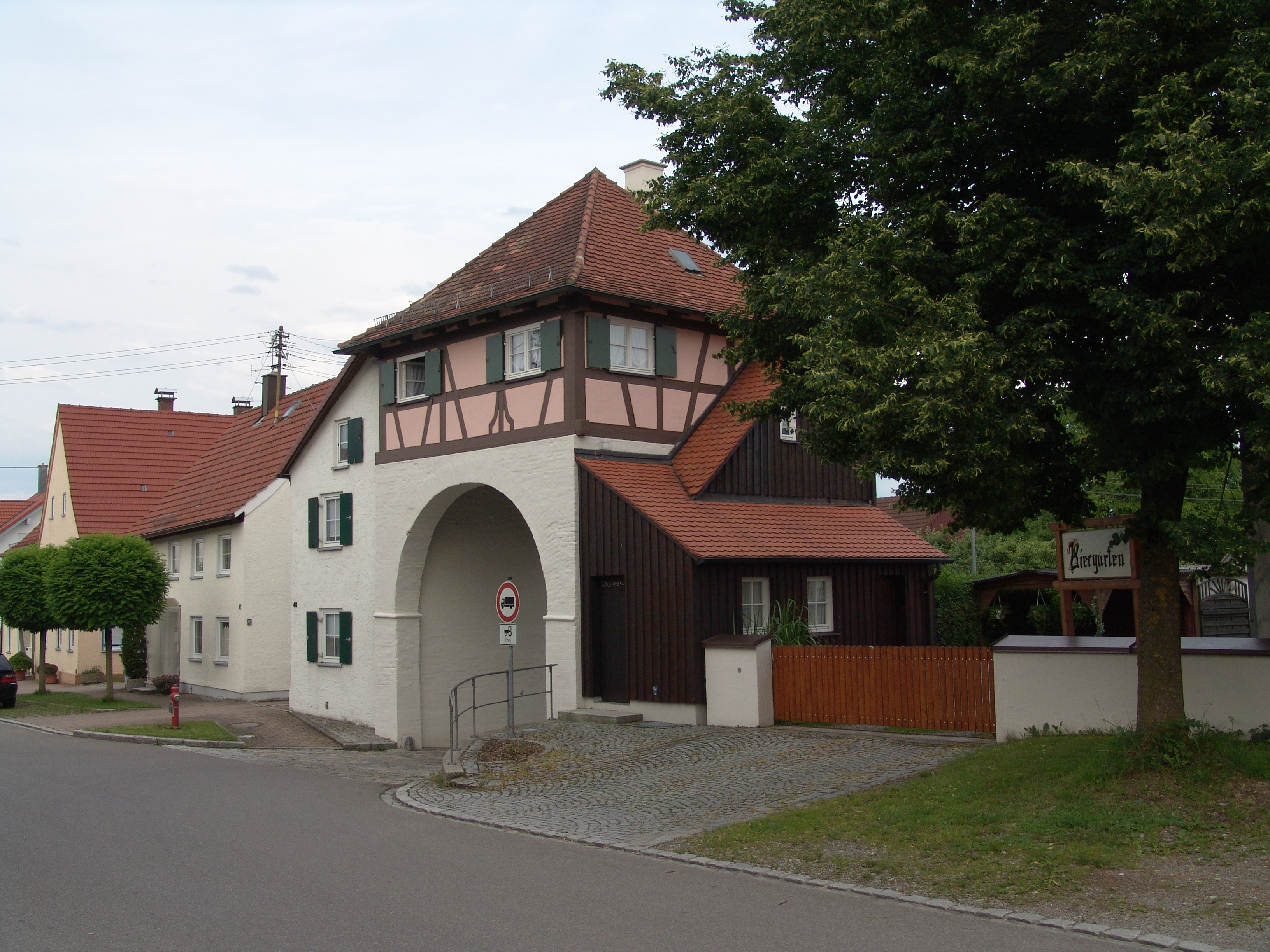 Illereichen Marktstrasse 38 40